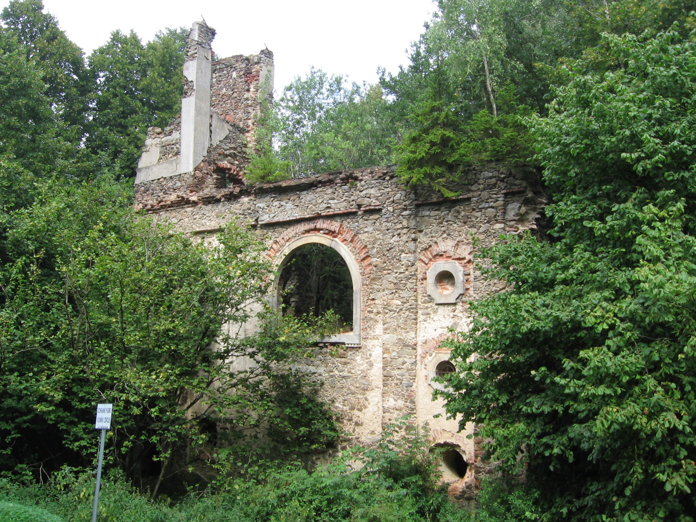 Česky: Ruiny kostela v zaniklé osadě Svatá Apolena